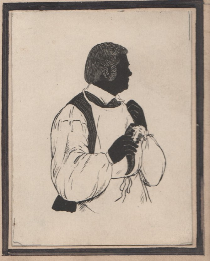 Georg Malter, 1840–1870 Gastwirt in Rathsberg bei Erlangen